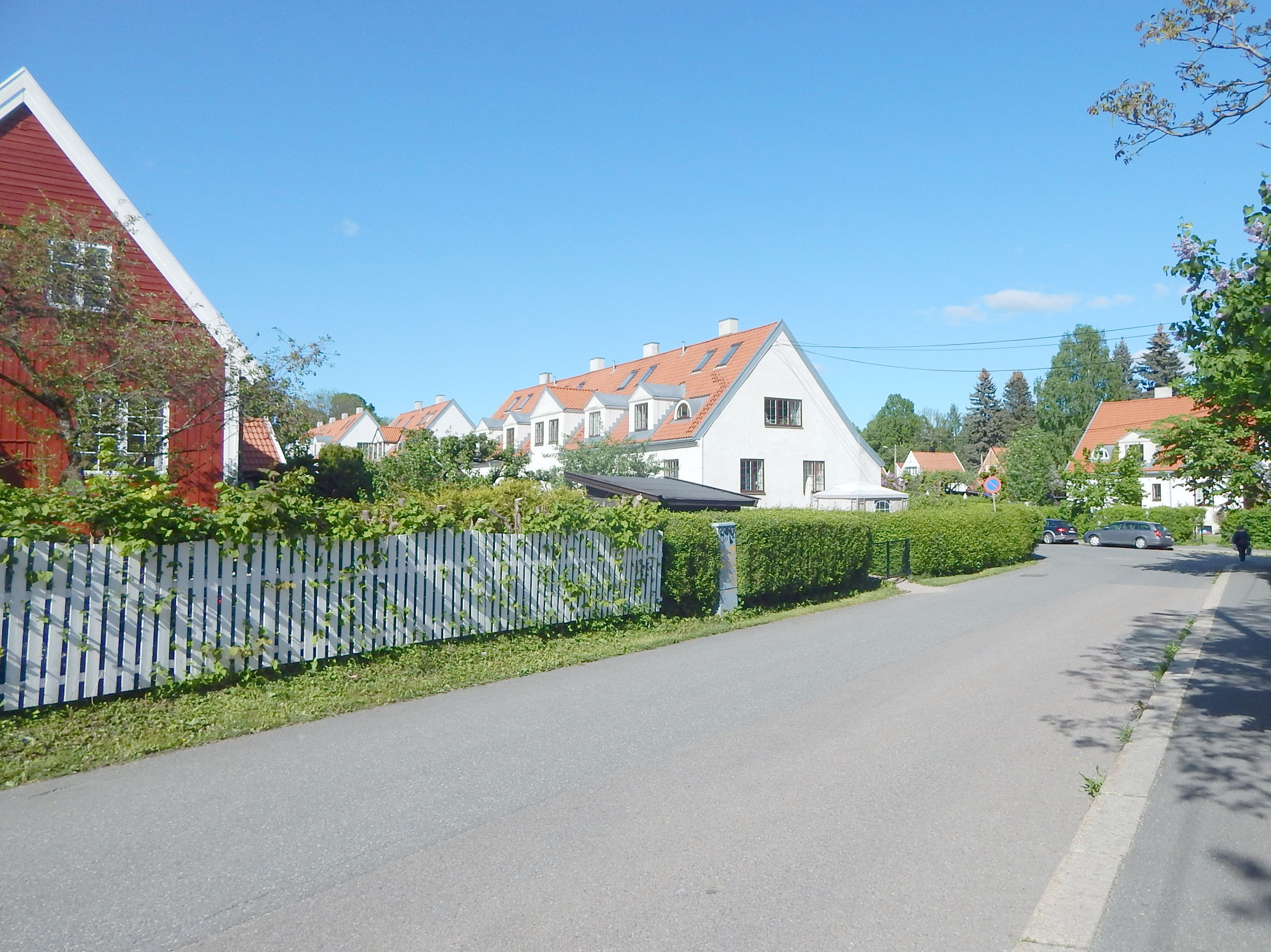 Soelvolds vei